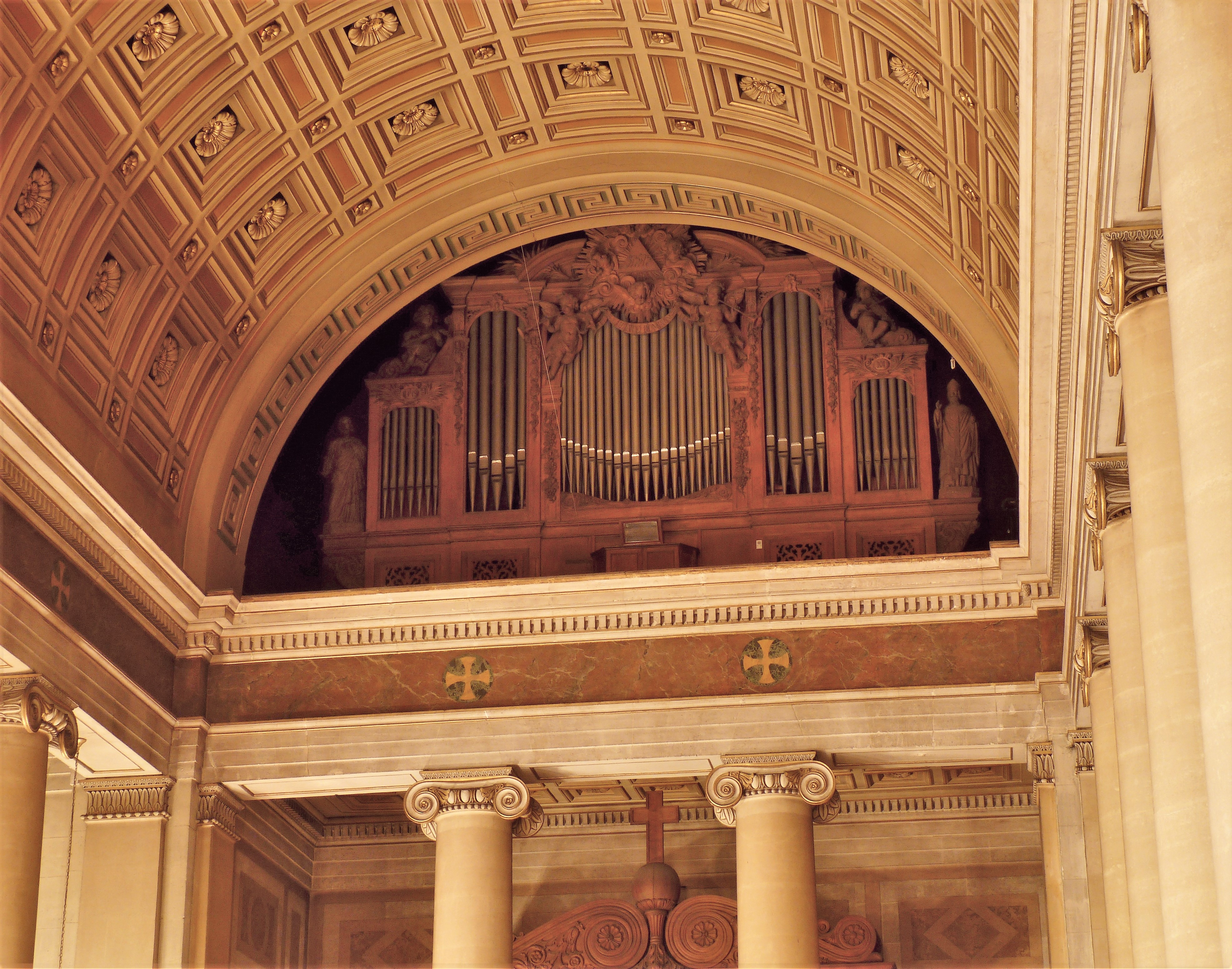 Buffet d'orgues de l'église Saint-Denys-du-Saint-Sacrement, Paris (5e arrondissement). Orgues du facteur Daublaire-Callinet (1839).